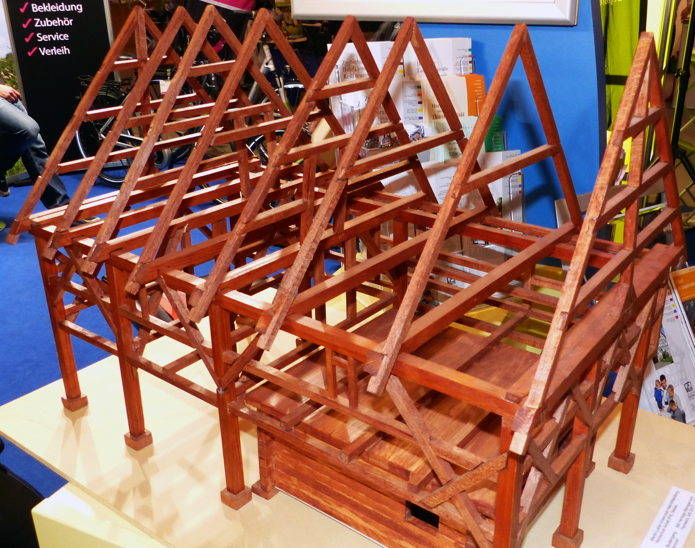 Modell eines Umgebindehauses Kleindöbschütz (M 1: 20), Stiftung Umgebindehaus, erstellt unter Anleitung von Arnd Matthes in einem Studiengang an der Martin-Luther-Universität Halle-Wittenberg/Hochschule Anhalt Dessau 2011/12, im Besitz der Stiftung Umgebindehaus